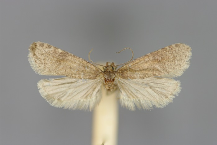 Levipalpus hepatariella (Lienig & Zeller, 1846), Männchen